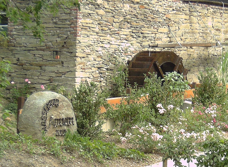 Wasserrad in Altenilpe (Schmallenberg), Germany.